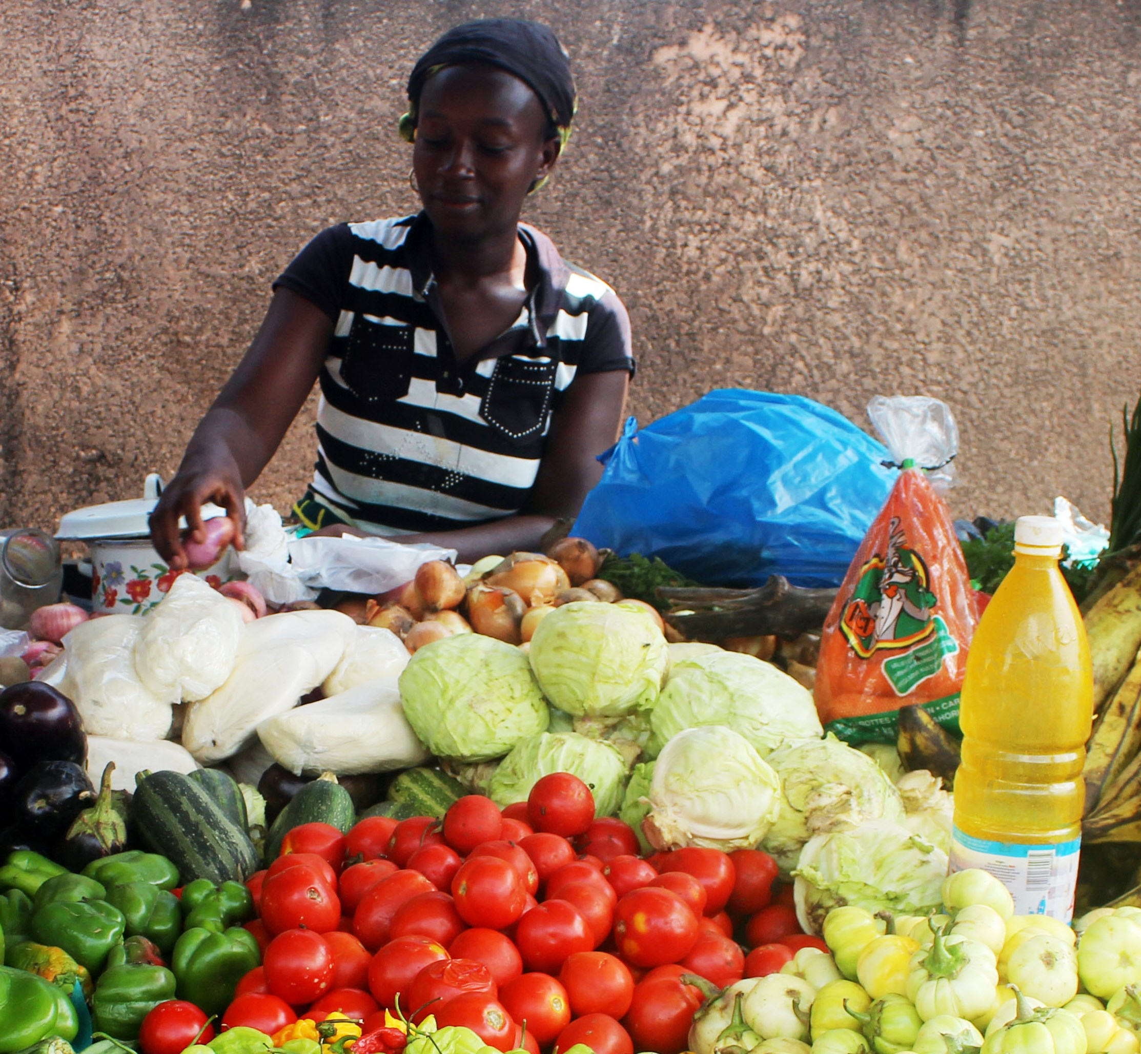 Étable d'une épicerie de quartier, tenue par une femme à Abidjan This is an image of "African people at work" from Ivory Coast